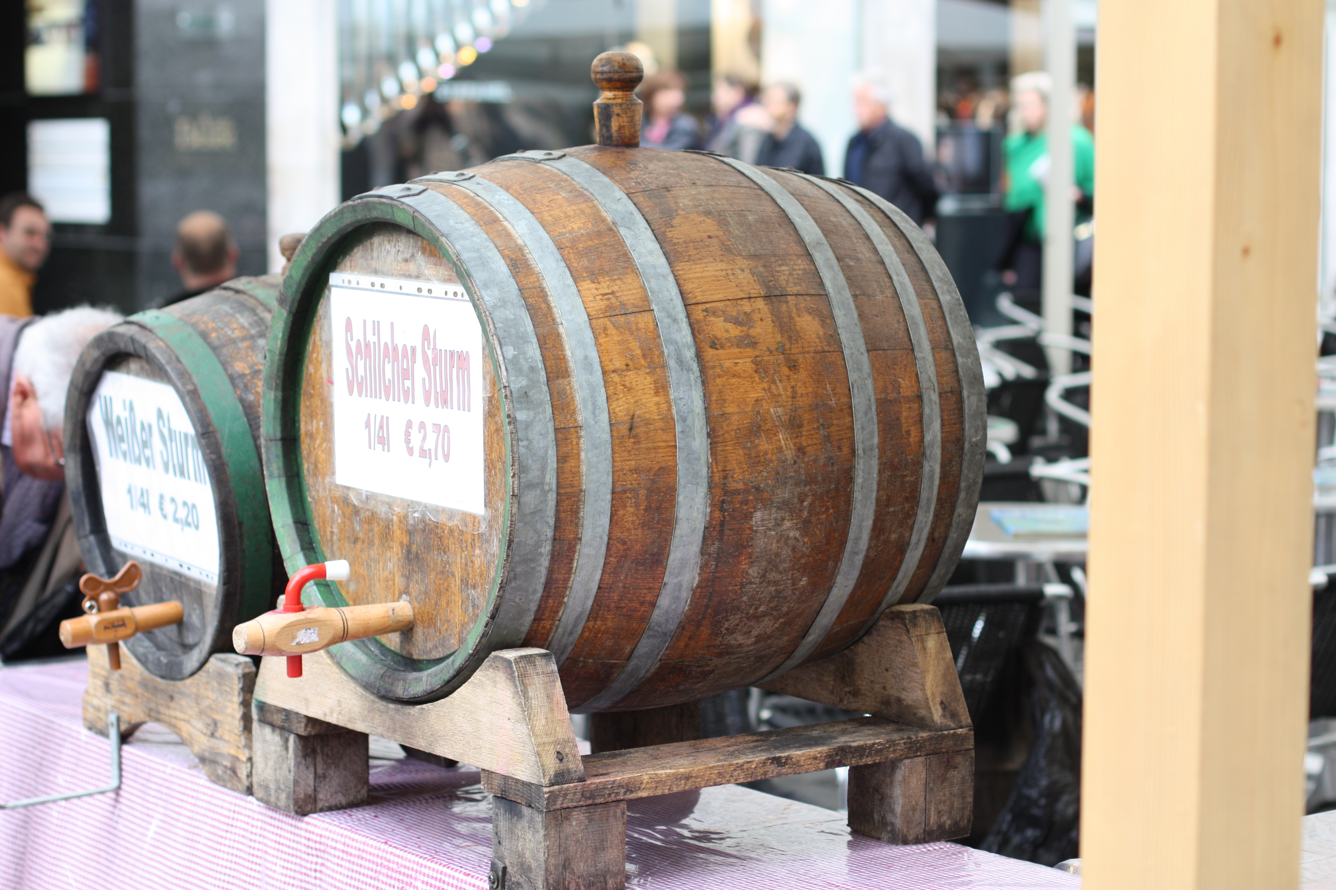 Sturm ( = Federweisser) im Fass; Weisser Sturm, Schilcher Sturm (Schilcher ist ein österreichischer Roséwein), Wien, 2009